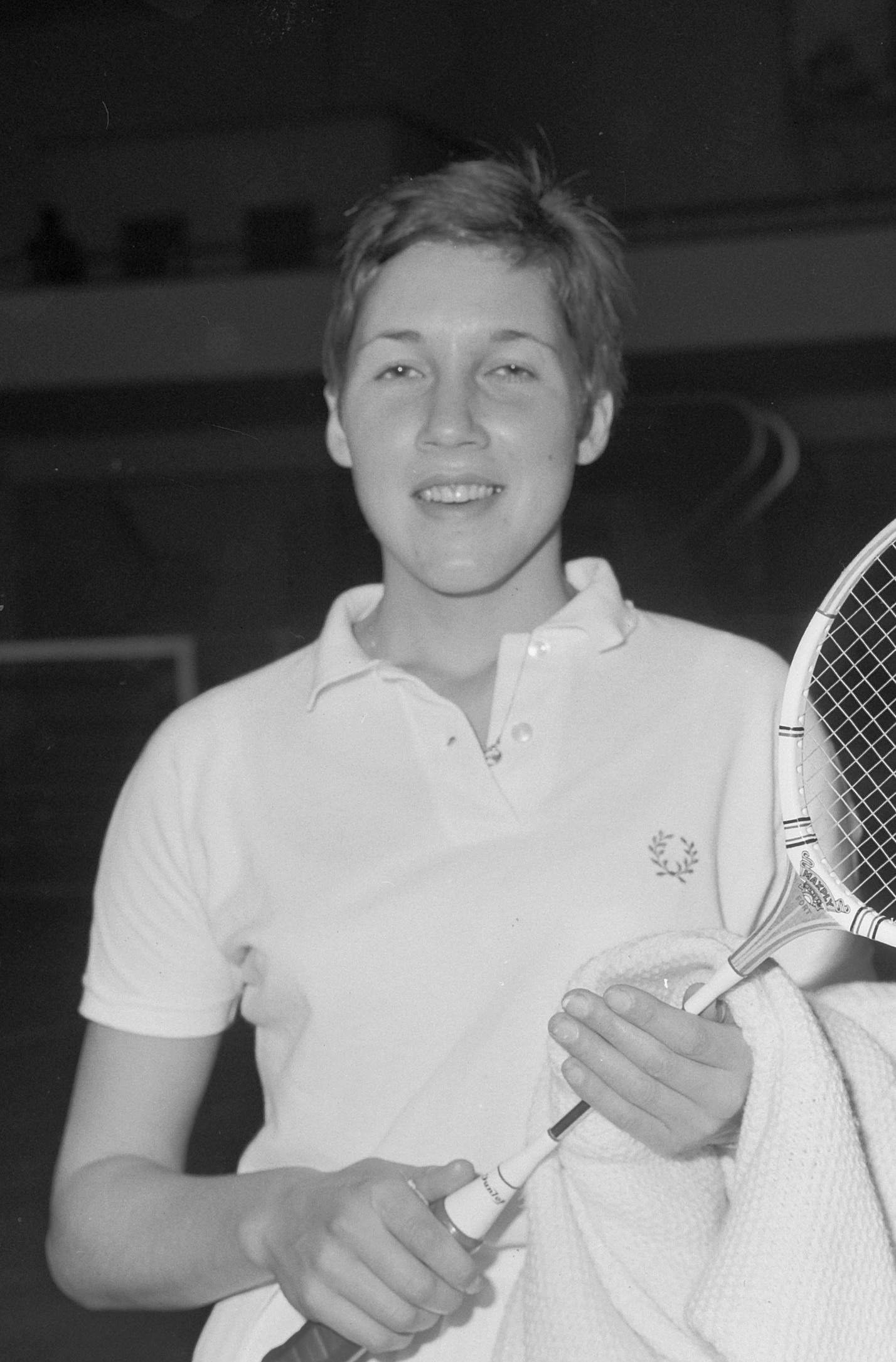 Badmintonkampioenschappen te Utrecht. Imre Rietveld